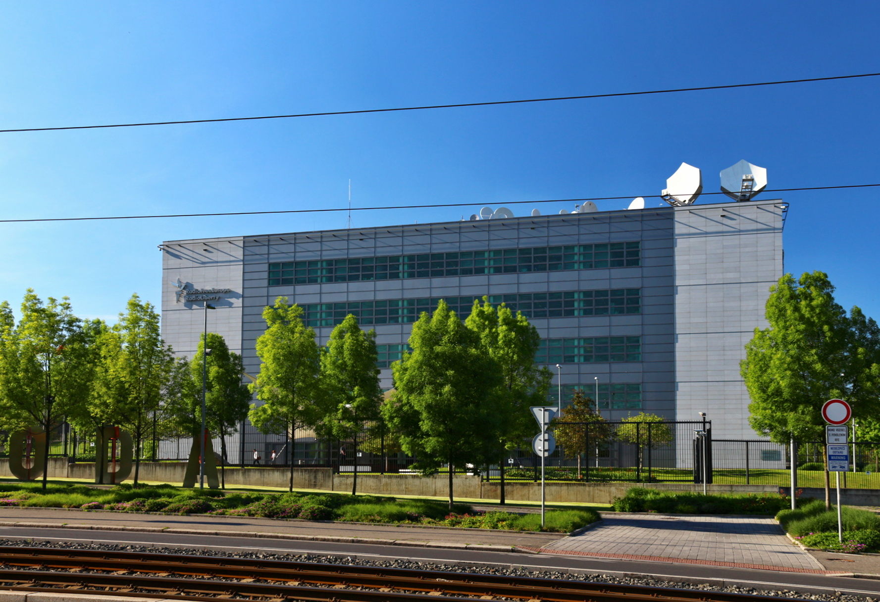 Budova Rádia Svobodná Evropa ve Strašnicích